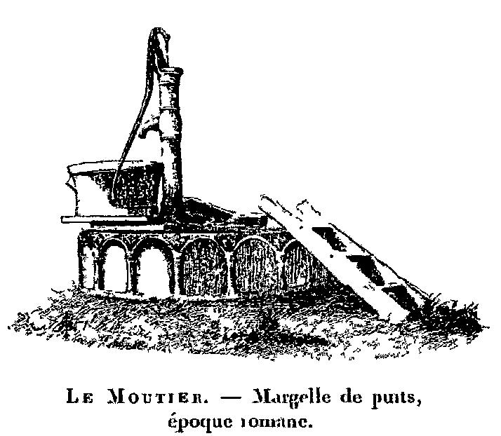 Le Prieuré du saint-Sépulcre de Jaligny - Puits du XIIe siècle - Gravure extraire de :Les fiefs du Bourbonnais (Tome 1 : Lapalisse), Aubert de La Faige et Roger de La Boutresse - 1896